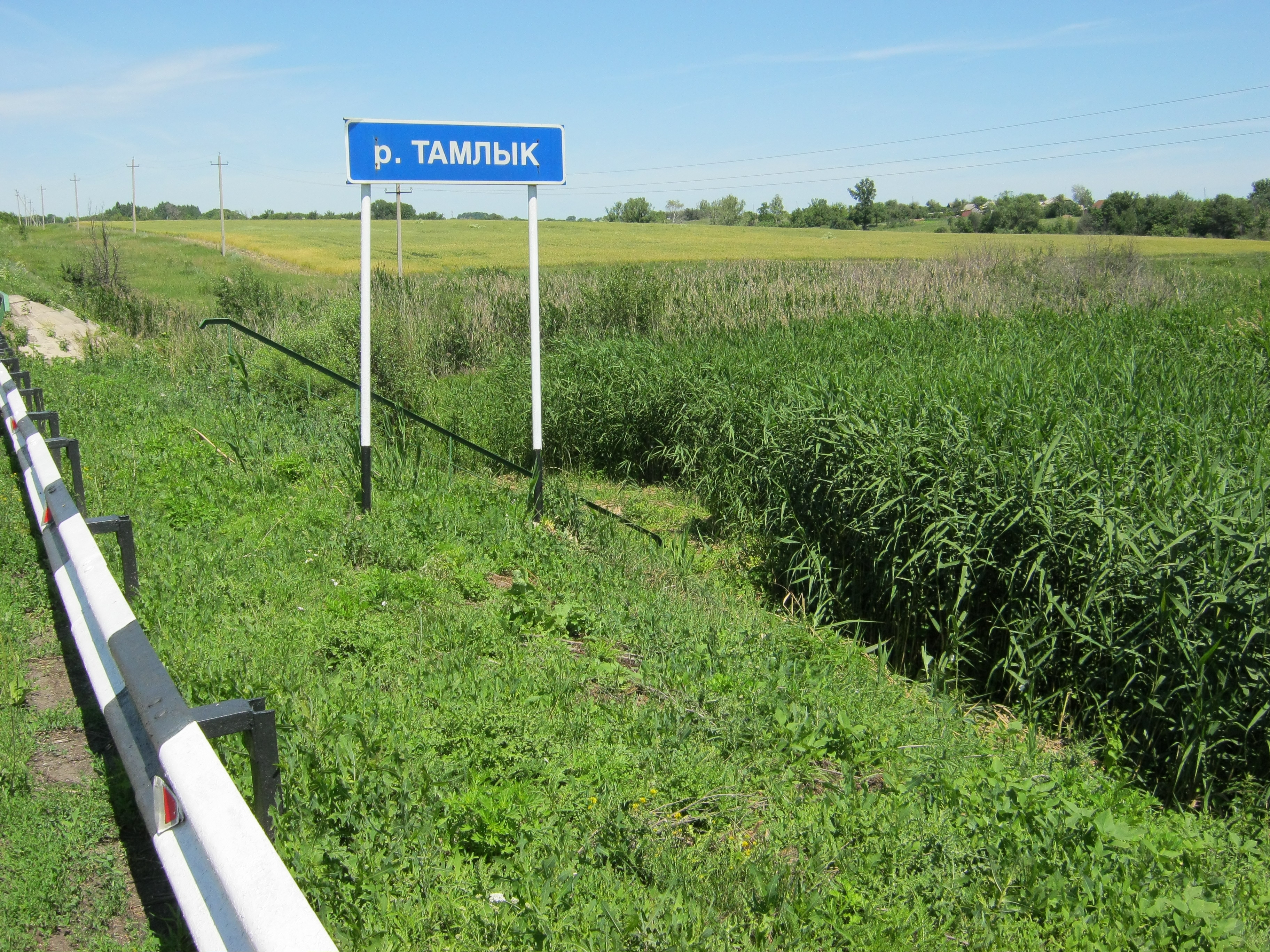 Переезд через р.Тамлык в Красном Лимане